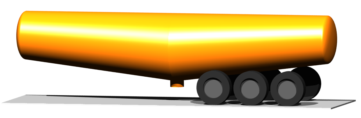 Schematisches Modell eines Kippsilofahrzeugs in Bauform 'Banane'.